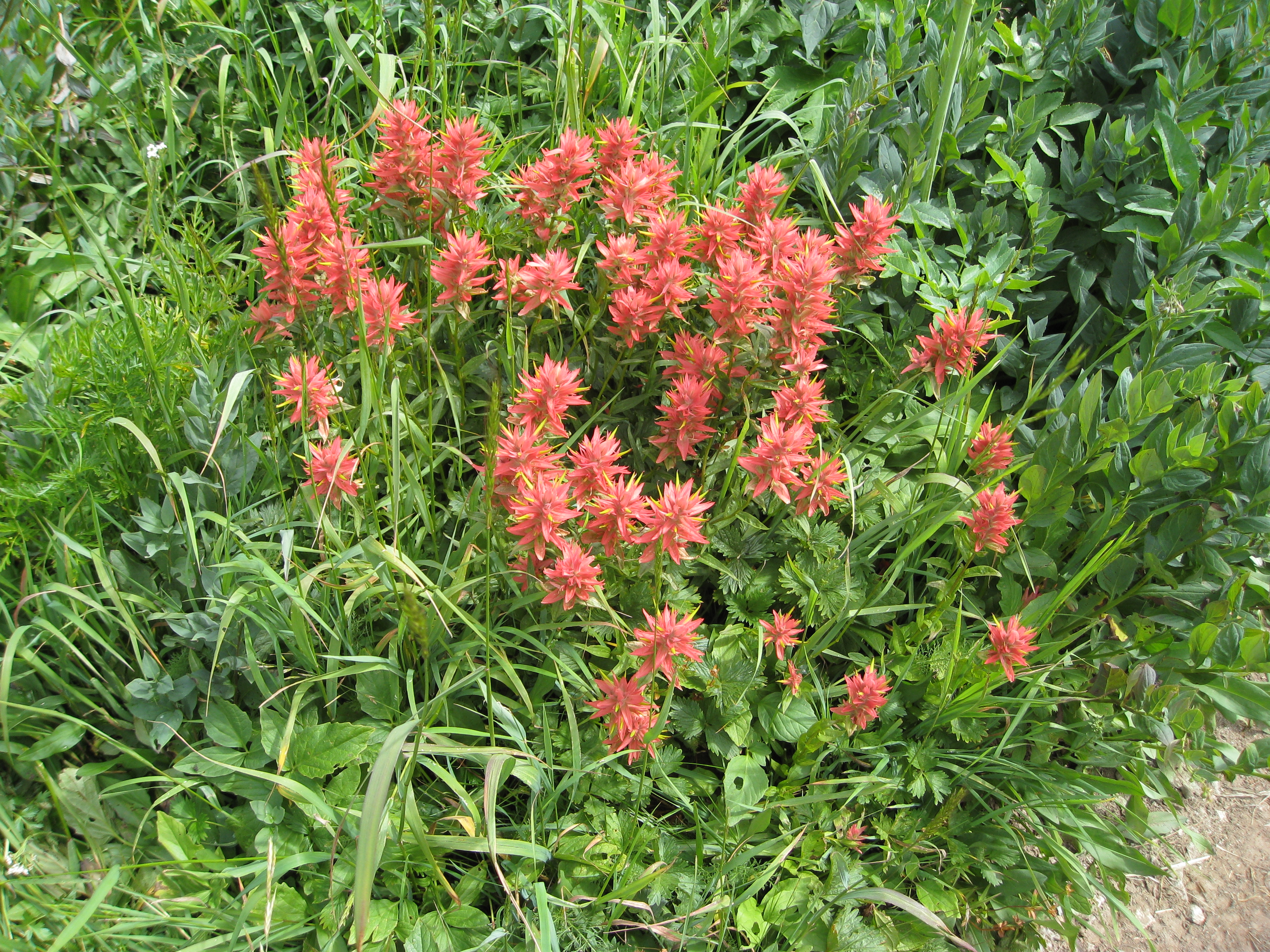 Castilleja miniata i080908 027